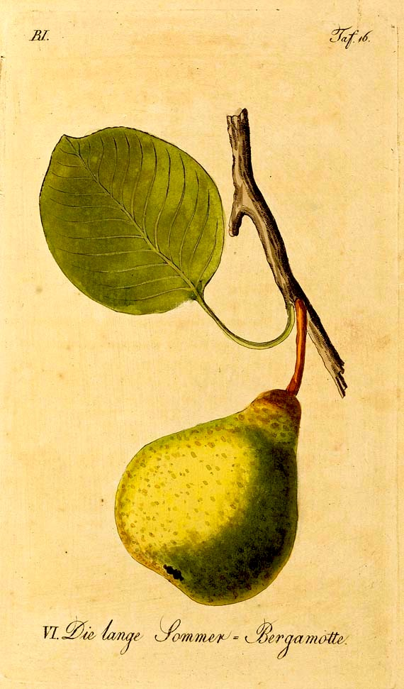 Die lange Sommer-Bergamotte, aus: J. V. Sickler, Der Teutsche Fruchtgarten als Auszug aus Sickler’s Teutschen Obstgärtner und von dem Allgemeinen Teutschen Garten-Magazine. Weimar, Landes-Industrie-Comptoir 1816–22.